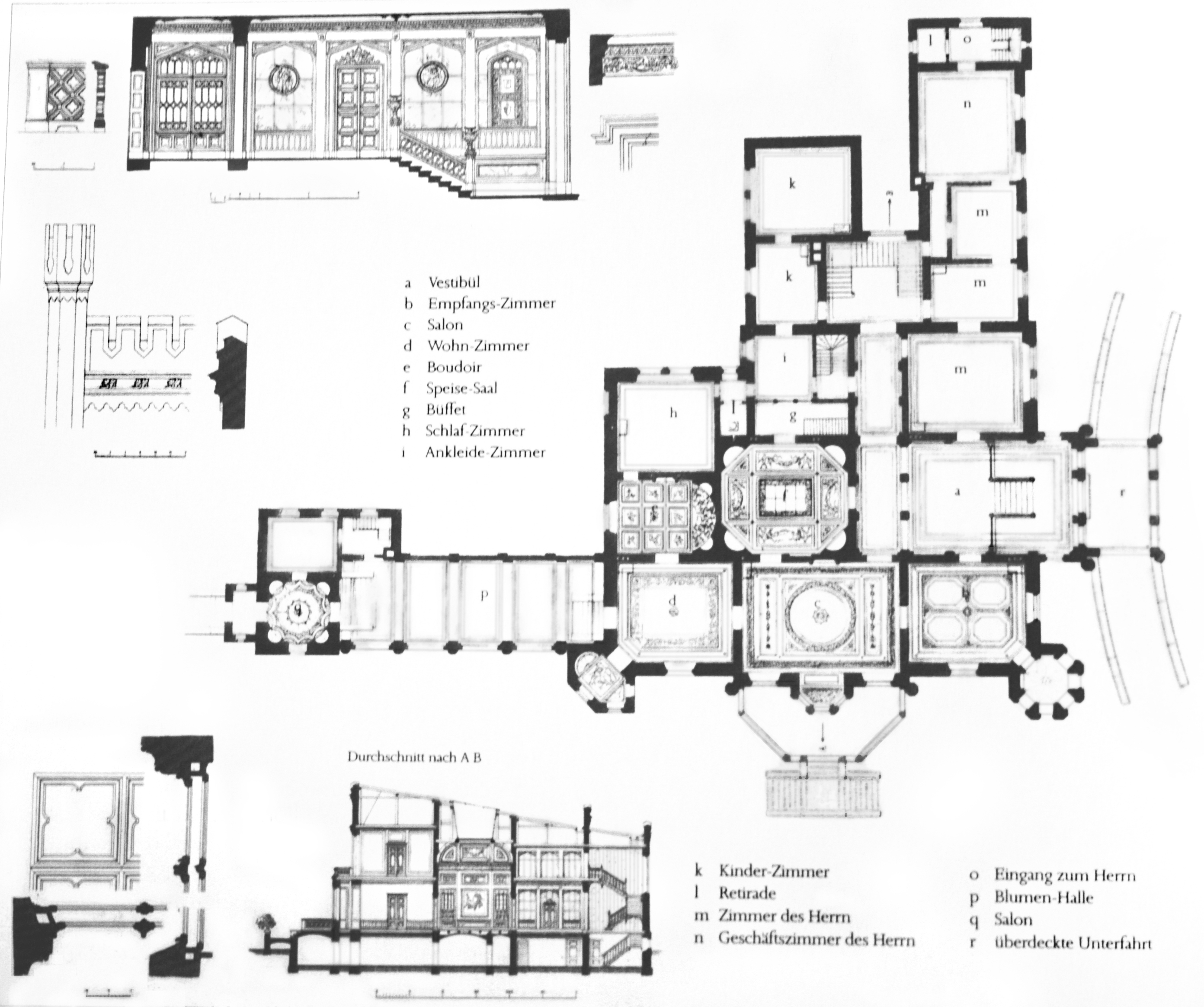 Schloss Kittendorf, Deutschland, Grundriss des Schlosses, aus: Friedrich Hitzig "Ausgeführte Bauwerke", 1850/67